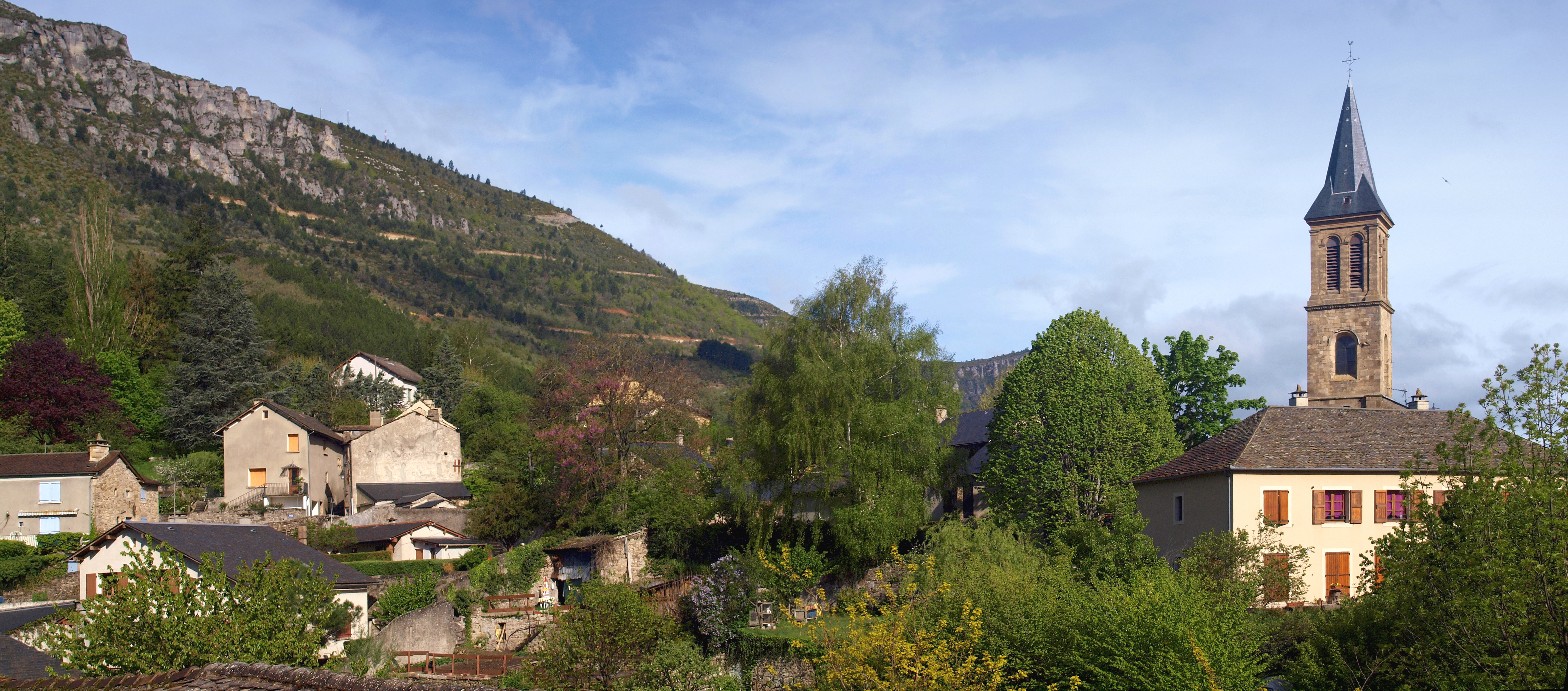 Florac (Lozère) - Panorama sur l'église Saint-Martin et la D16 sur les contreforts du Causse Méjean